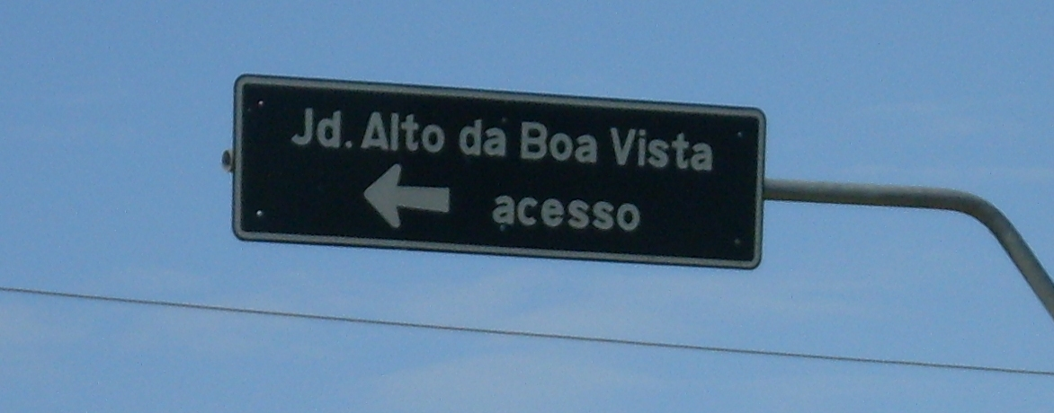 Placa de Acesso ao Jardim Alto da Boa Vista.